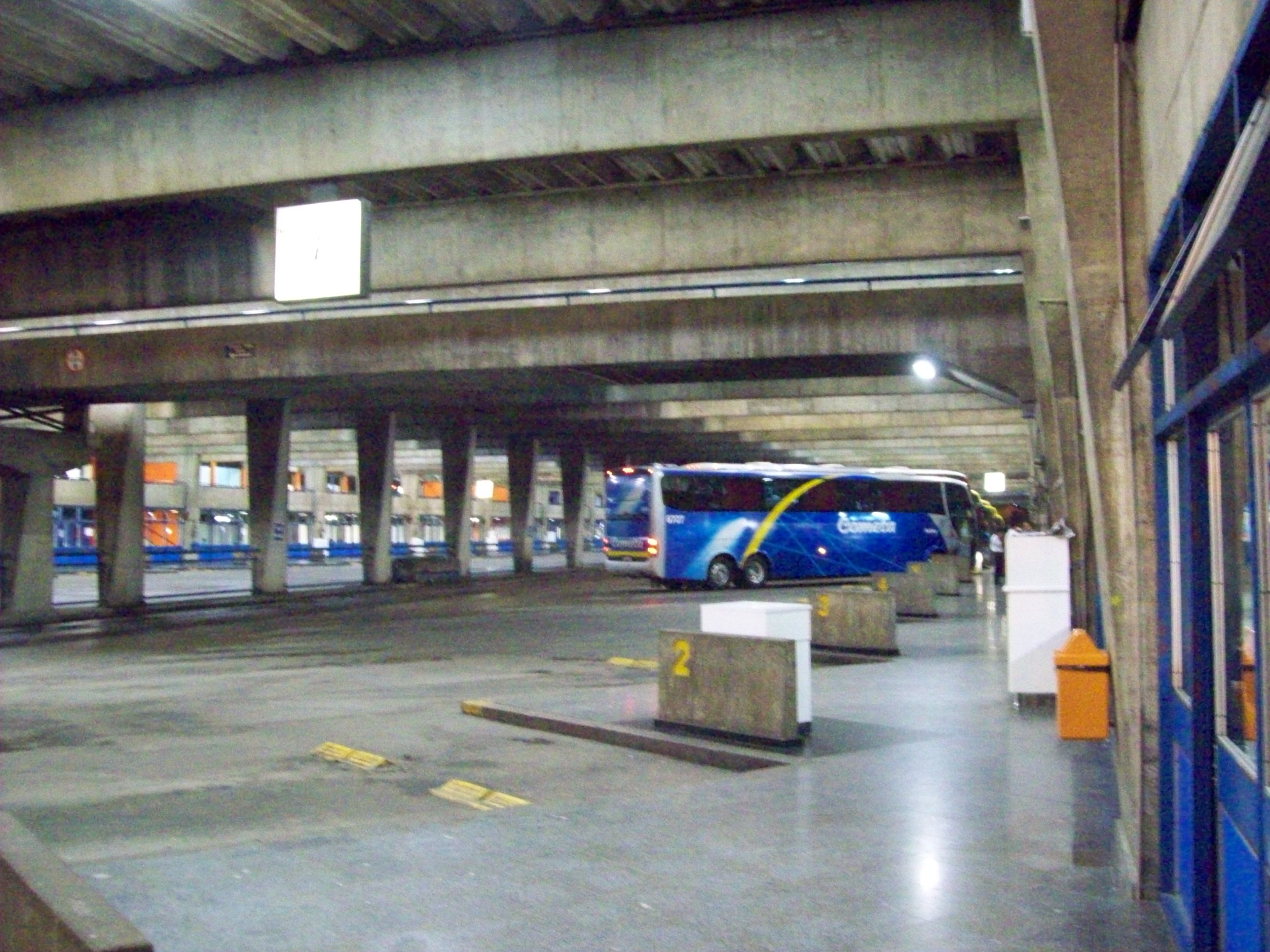 Madrugada na Rodoviária de Curitiba